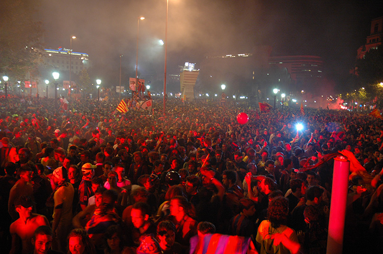 Cel·lebració de la Copa d'Europa a la Plaça Catalunya de Barcelona.